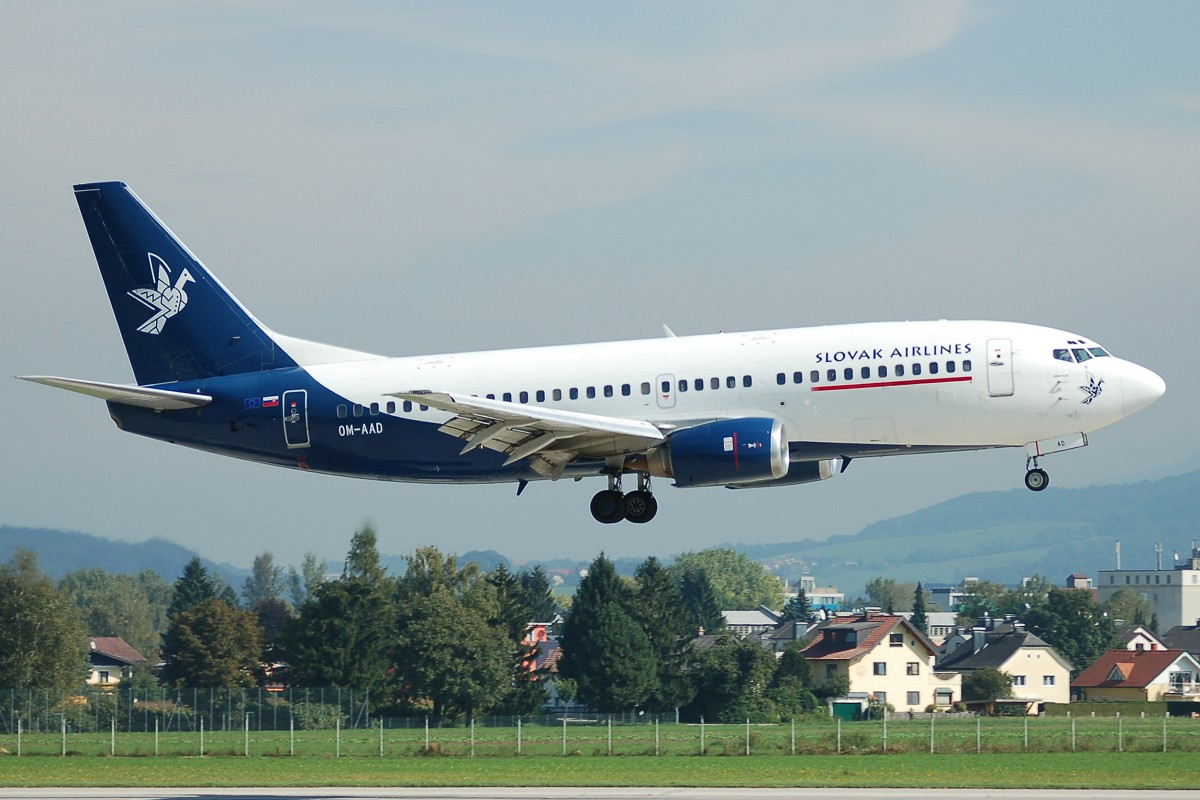 Slovak Airlines Boeing 737-300